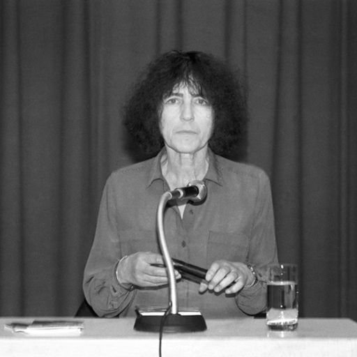 Die Schriftstellerin Gabriele Wohmann bei einer Lesung 08/1992 in München. Veröffentlicht in Münchner Merkur Nr. 232, 8. Oktober 1992, Seite W3